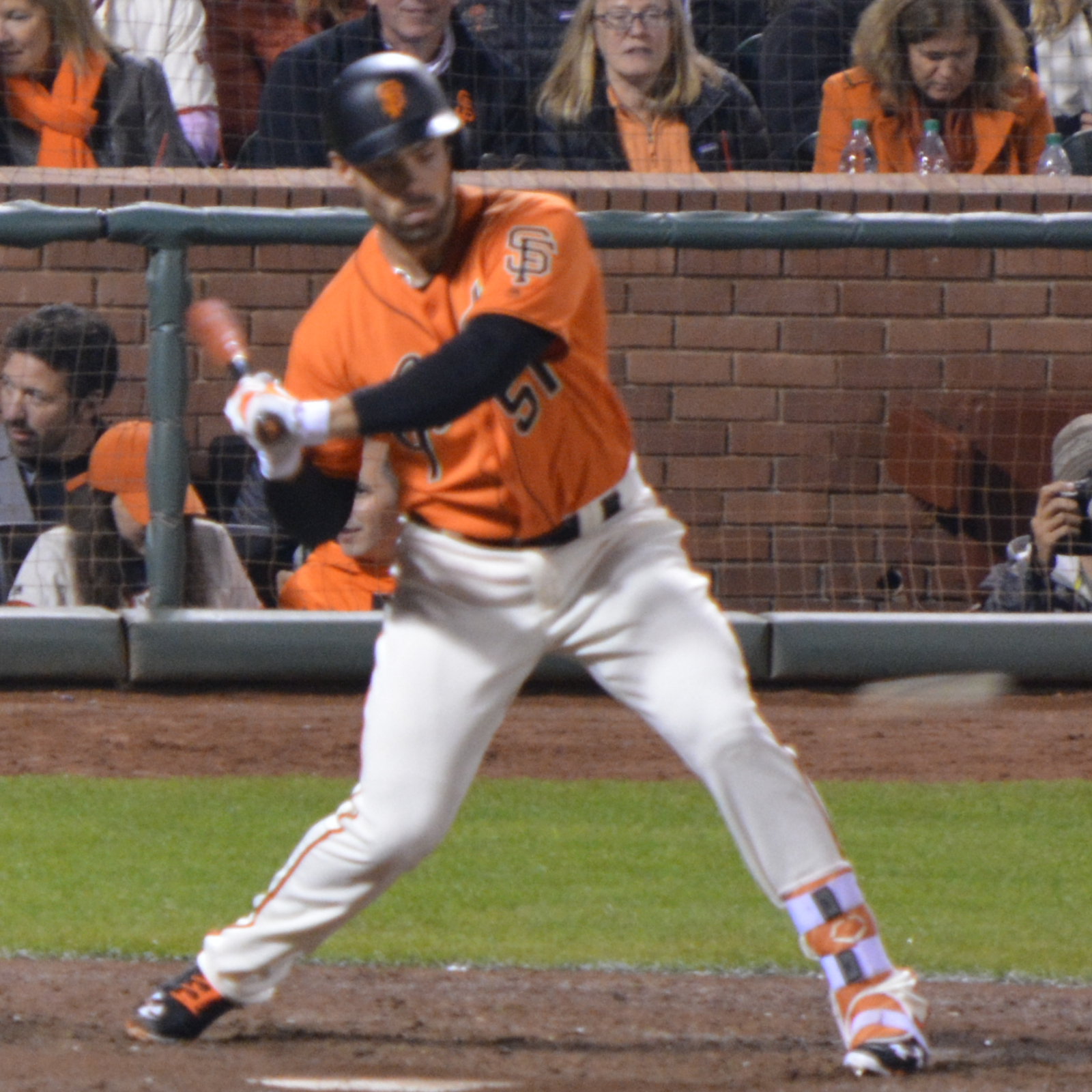 Mac Williamson